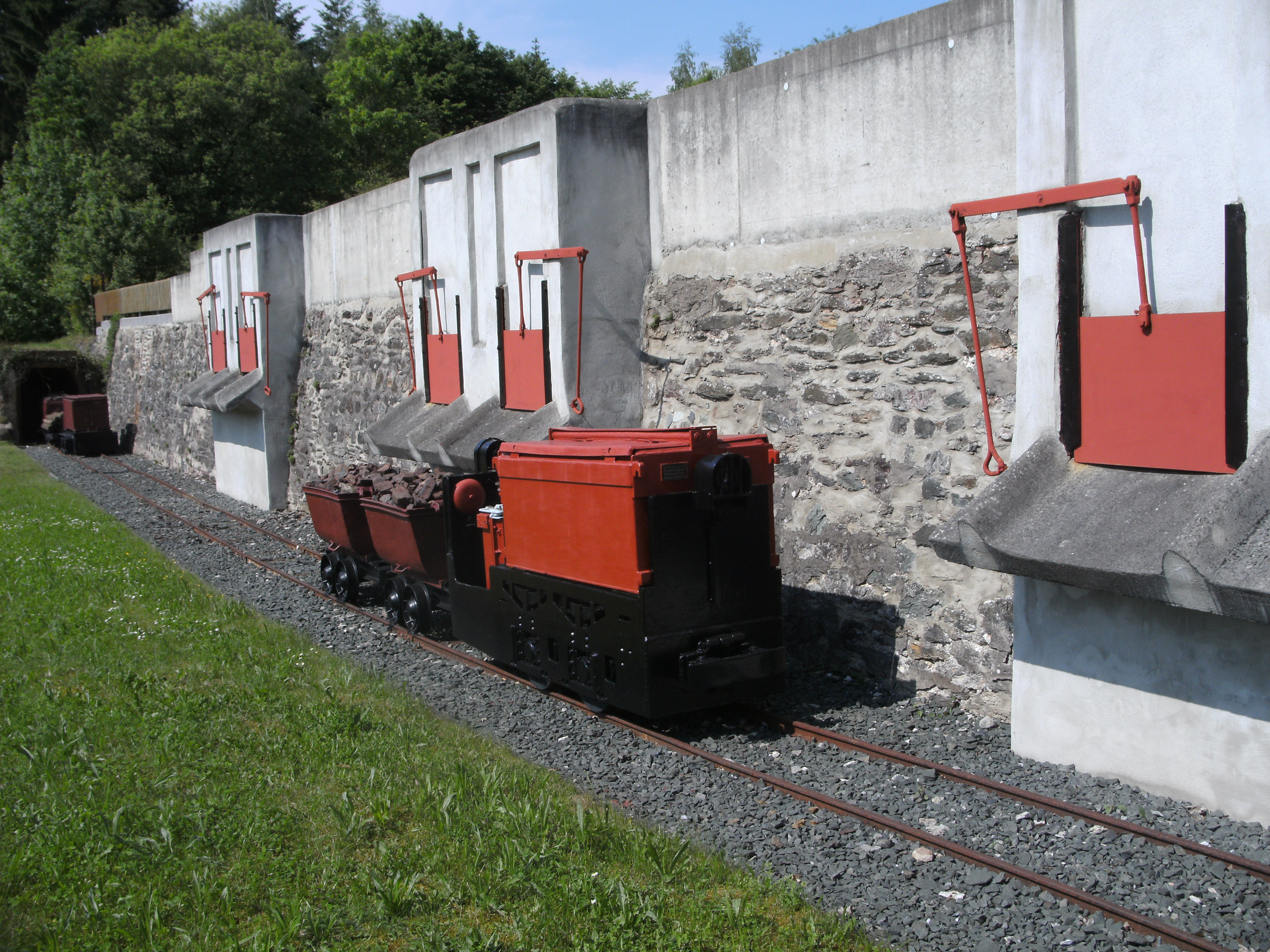 Verladestation der ehemaligen Eisenerzgrube „Allerheiligen“, Ahausen (Stadtteil von Weilburg)